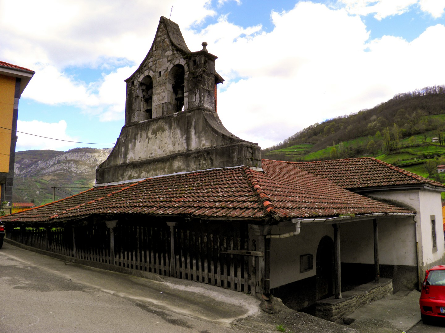 Iglesia parroquial de Bello, Aller, Asturias